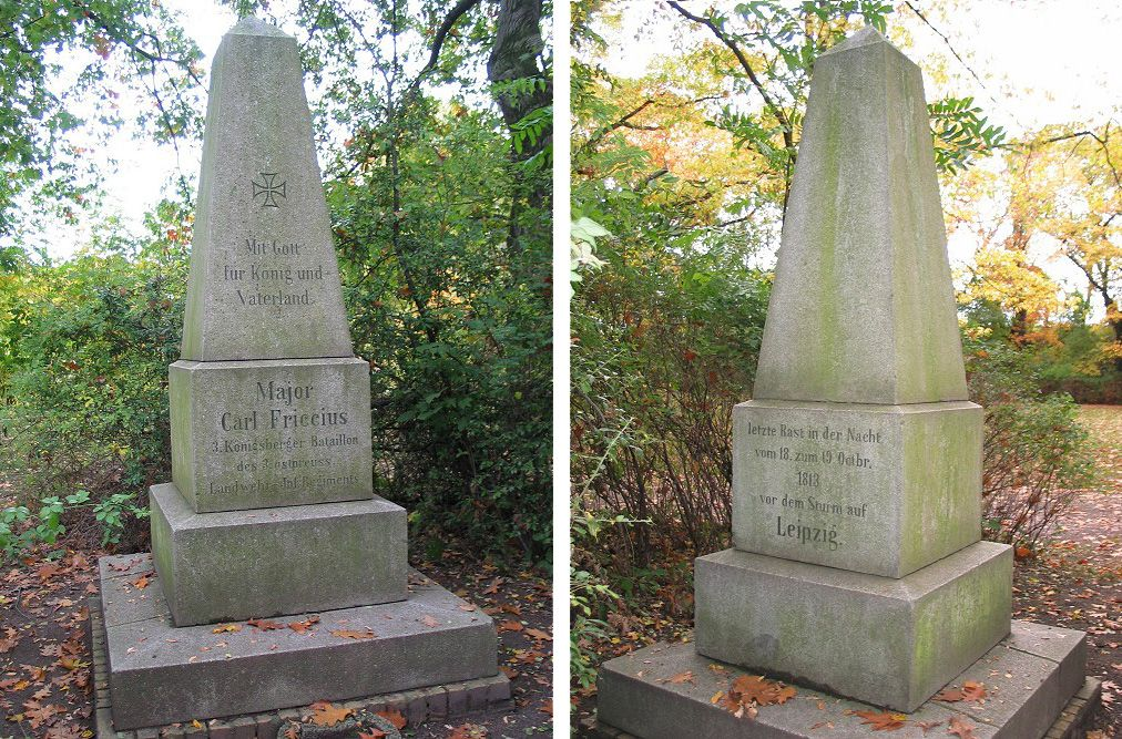 Der Apelstein Nr. 43 als Erinnerung an die Völkerschlacht bei Leipzig